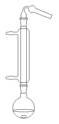 Rückflußkochen